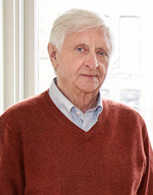 Jacques Godbout en 2014, Photo: Frédérick Duchesne